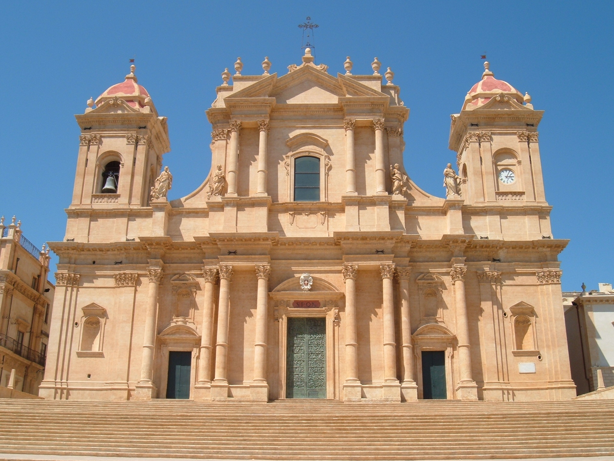 Facciata della cattedrale di Noto dopo il restauro